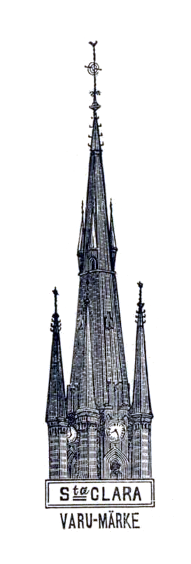 Clara fabriks firmamärke ur en annons från 1889.